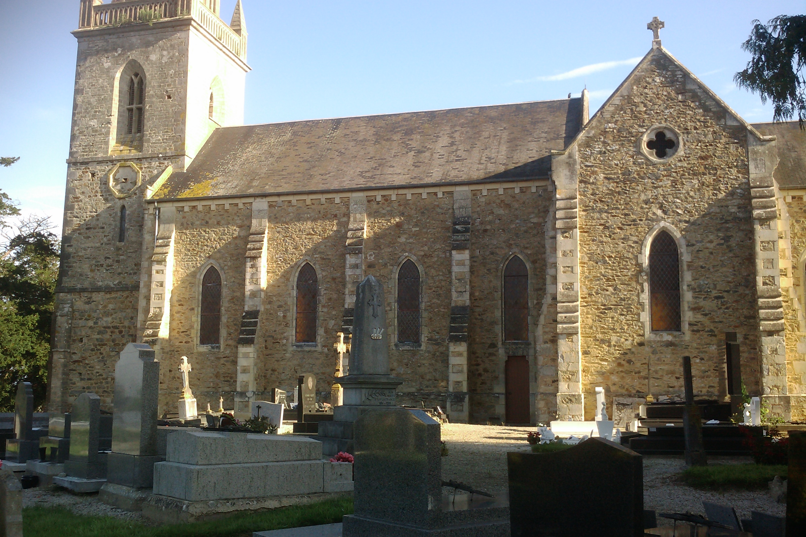 Église des Les Champs-de-Losque